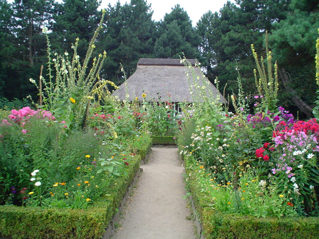 Bauerngarten des Botanischen Gartens in Hamburg.